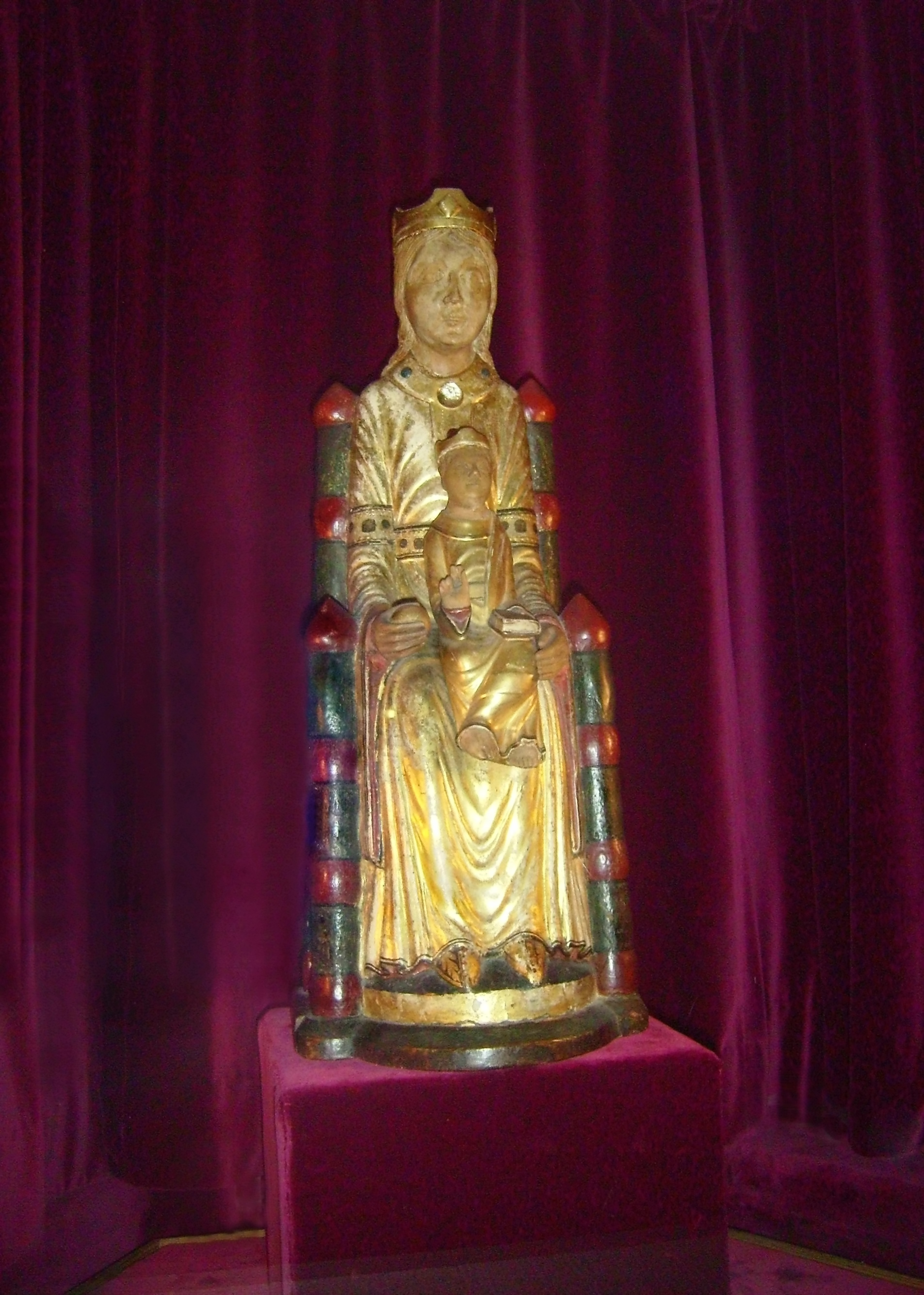 Kloster Oelinghausen - Gnadenbild "Kölsche Madonna" (57 cm hoch, Lindenholz, 13. Jahrhundert)